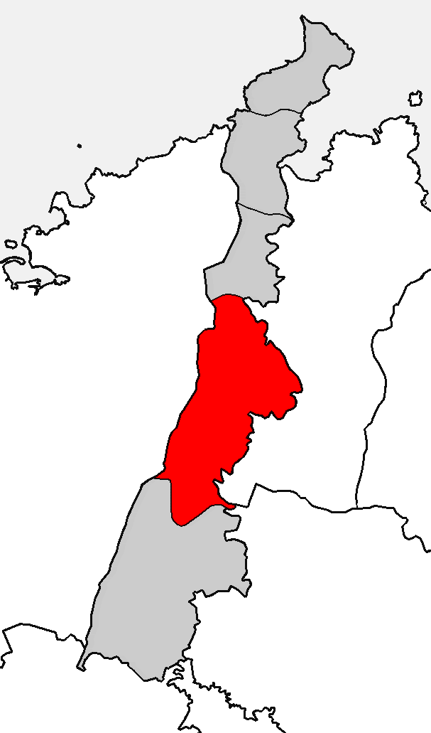 Situación da parroquia de Mañón no concello de Mañón